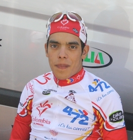 Jarlinson Pantano au Circuit de la Sarthe 2011